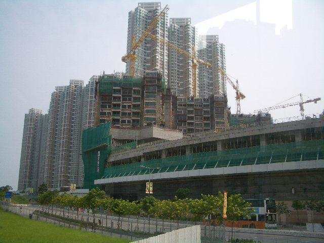 User:Kwan Zheung Laonnie: 將軍澳 Tseung Kwan O, Hong Kong